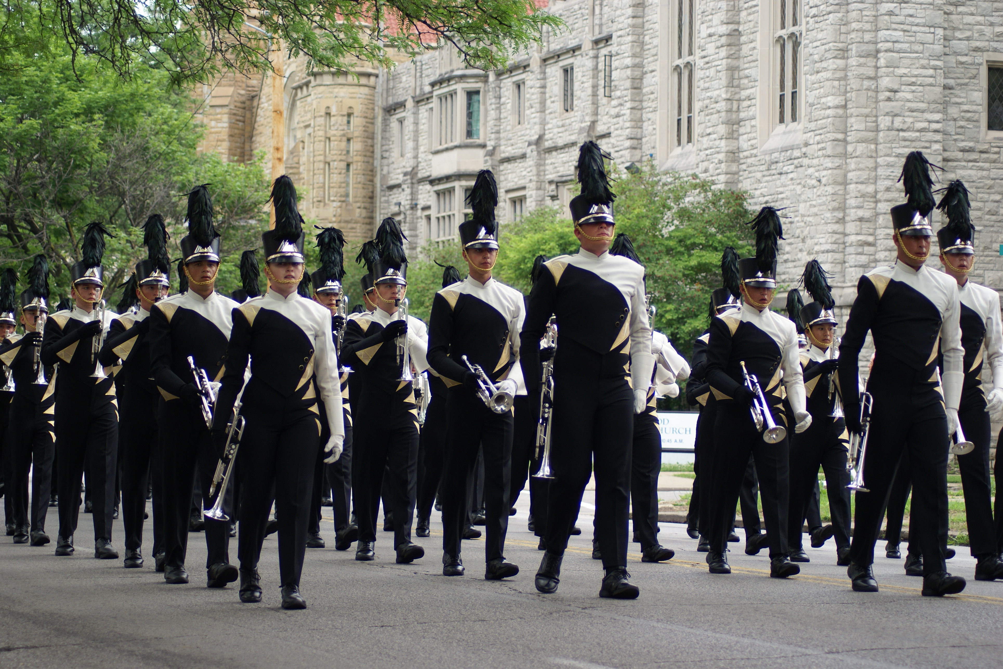 Glassmen Drum and Bugle Corps